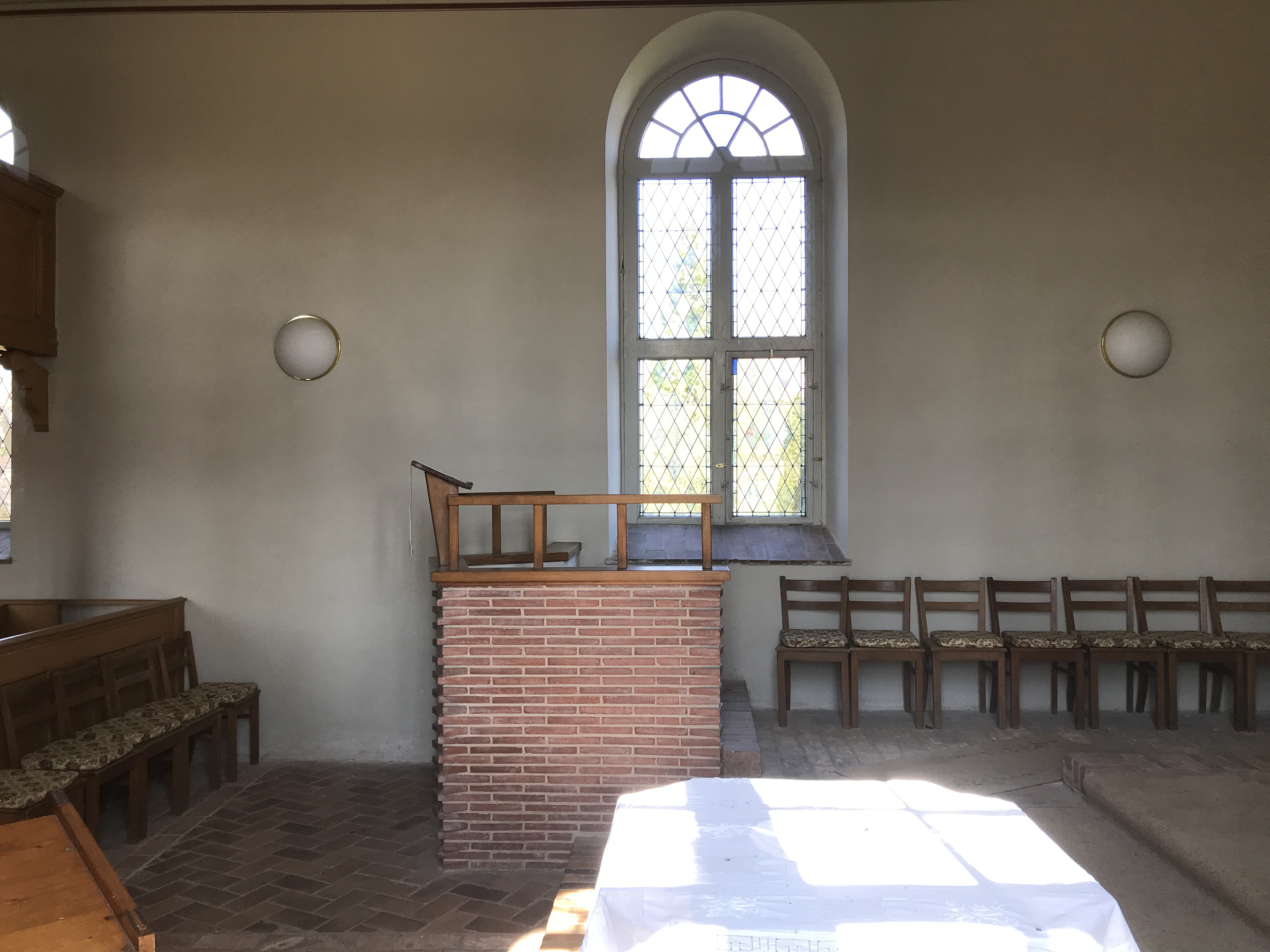 Die evangelische Dorfkirche Bliesendorf ist eine neugotische Saalkirche in Bliesendorf, einem Ortsteil der Stadt Werder (Havel) im Landkreis Potsdam-Mittelmark im Land Brandenburg.